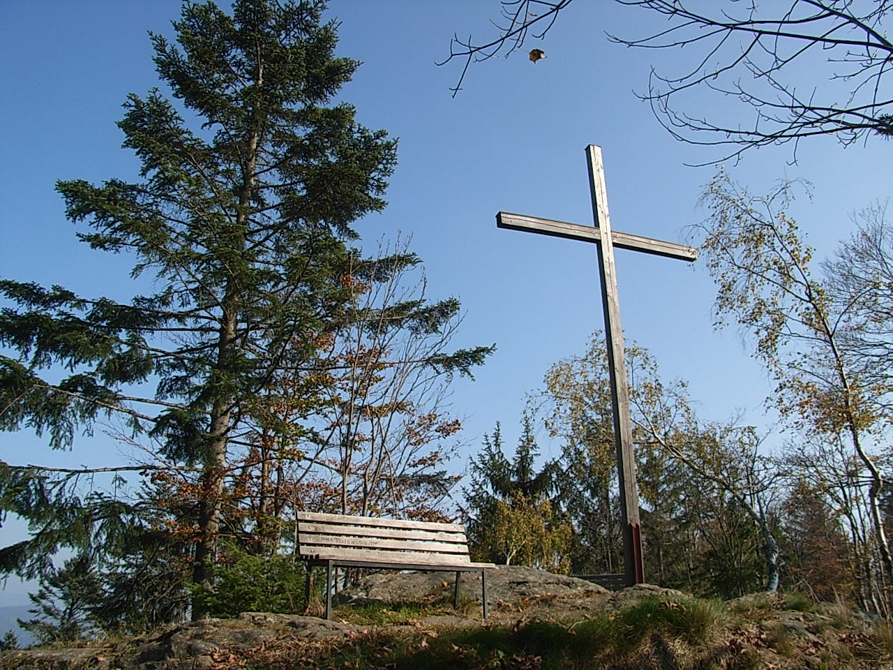 Gipfel des Kronbergs, mit (links) Abies alba